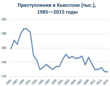 Источники данных: Citywide Uniform Crime Statistics 1985—2004: Отчёты ФБР: 1995—2015: Ссылка для дальнейшего обновления